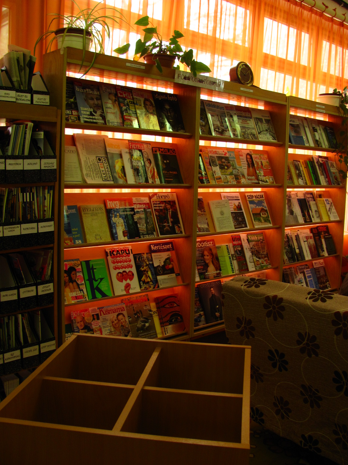 A könyvtár folyóiratolvasó része